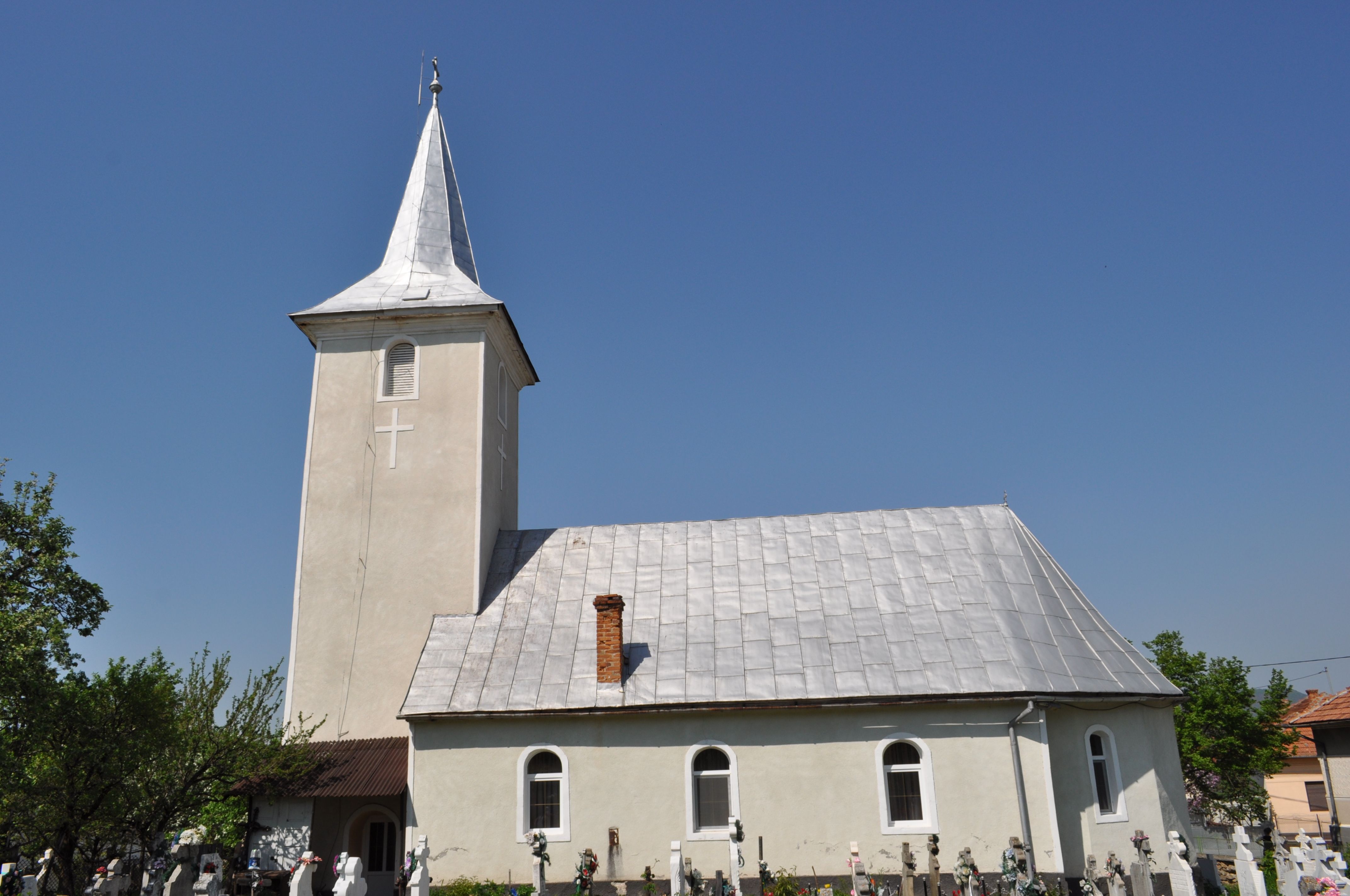 Biserica "Sf. Atanasie şi Chiril", sat SĂLAŞU DE SUS; comuna SĂLAŞU DE SUS